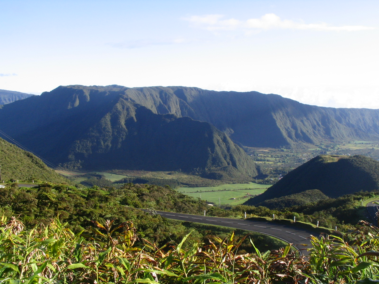 la Plaine des Palmistes vue depuis le Col de Bellevue